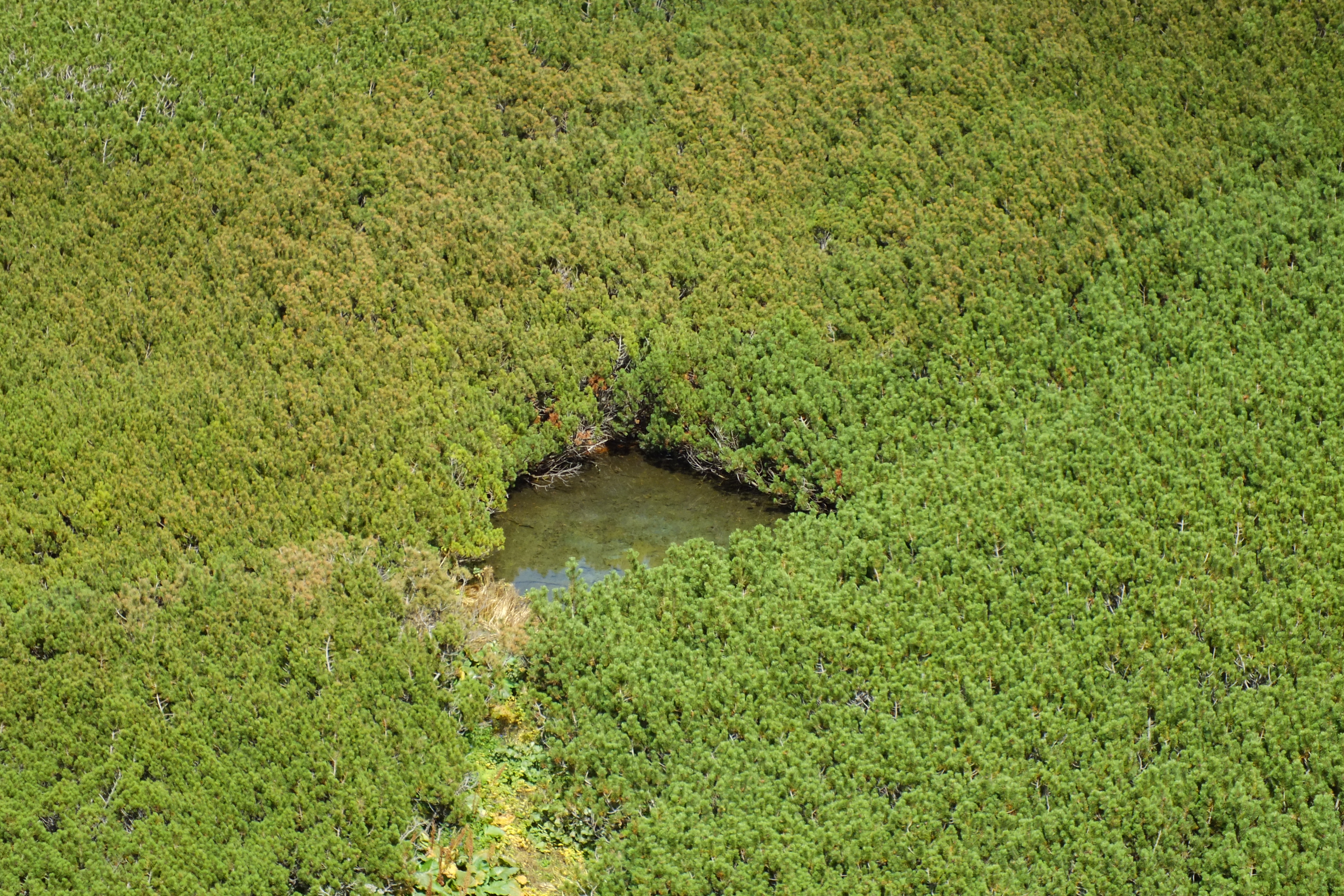 Озерце Невидимка з приблизними координатами N48.1125 E24.5712 має кам'янисте дно, прозору вооду, береги повністю поросші чагарником Гірської сосни.